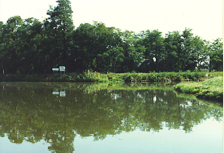 propre photo